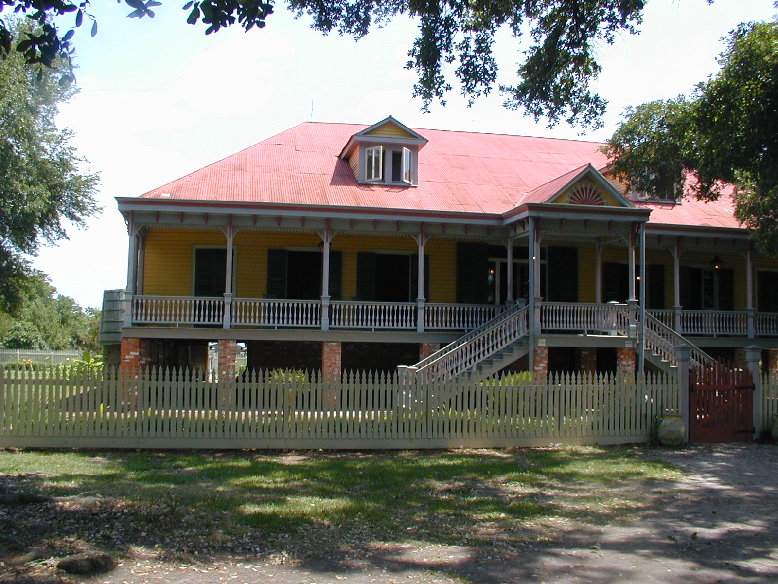 Laura Plantation House, Louisiana, 2001